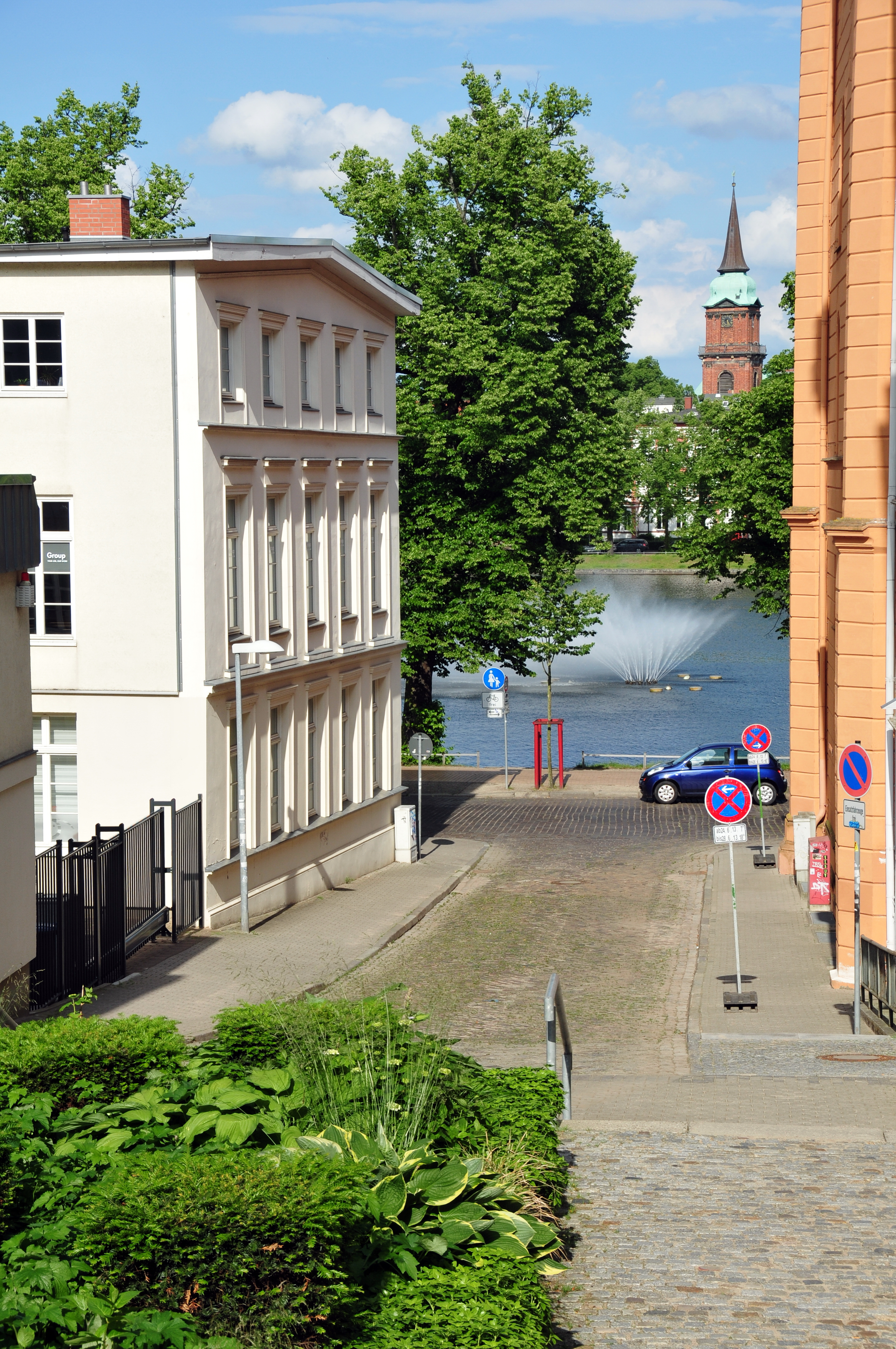 Schwerin; mit 50mm Brennweite von der Orangerie zum Bahnhof noch ein schneller Blick Richtung Pfaffenteich